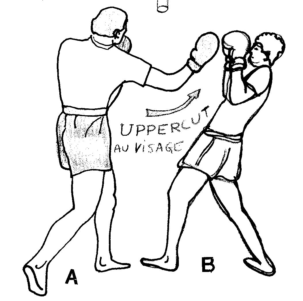 uppercut2.jpg